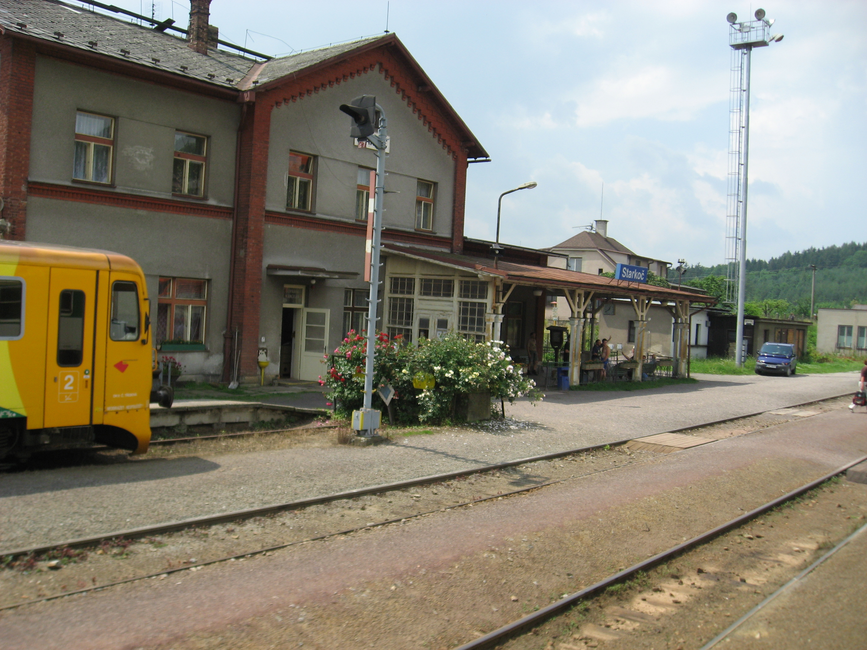 Starkoč